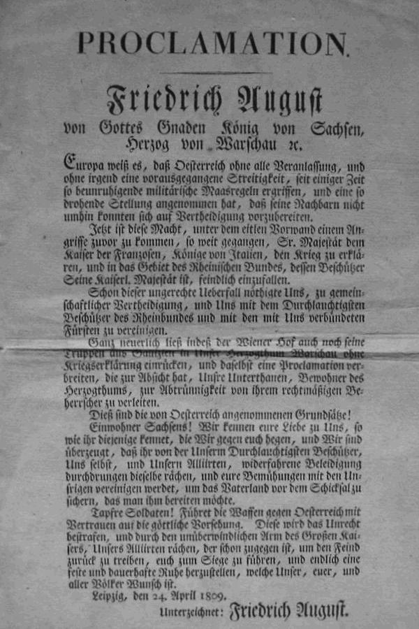 Proclamation - Friedrich August, von Gottes Gnaden König von Sachsen und Herzog von "Warschau". Leipzig, den 24. April 1809.